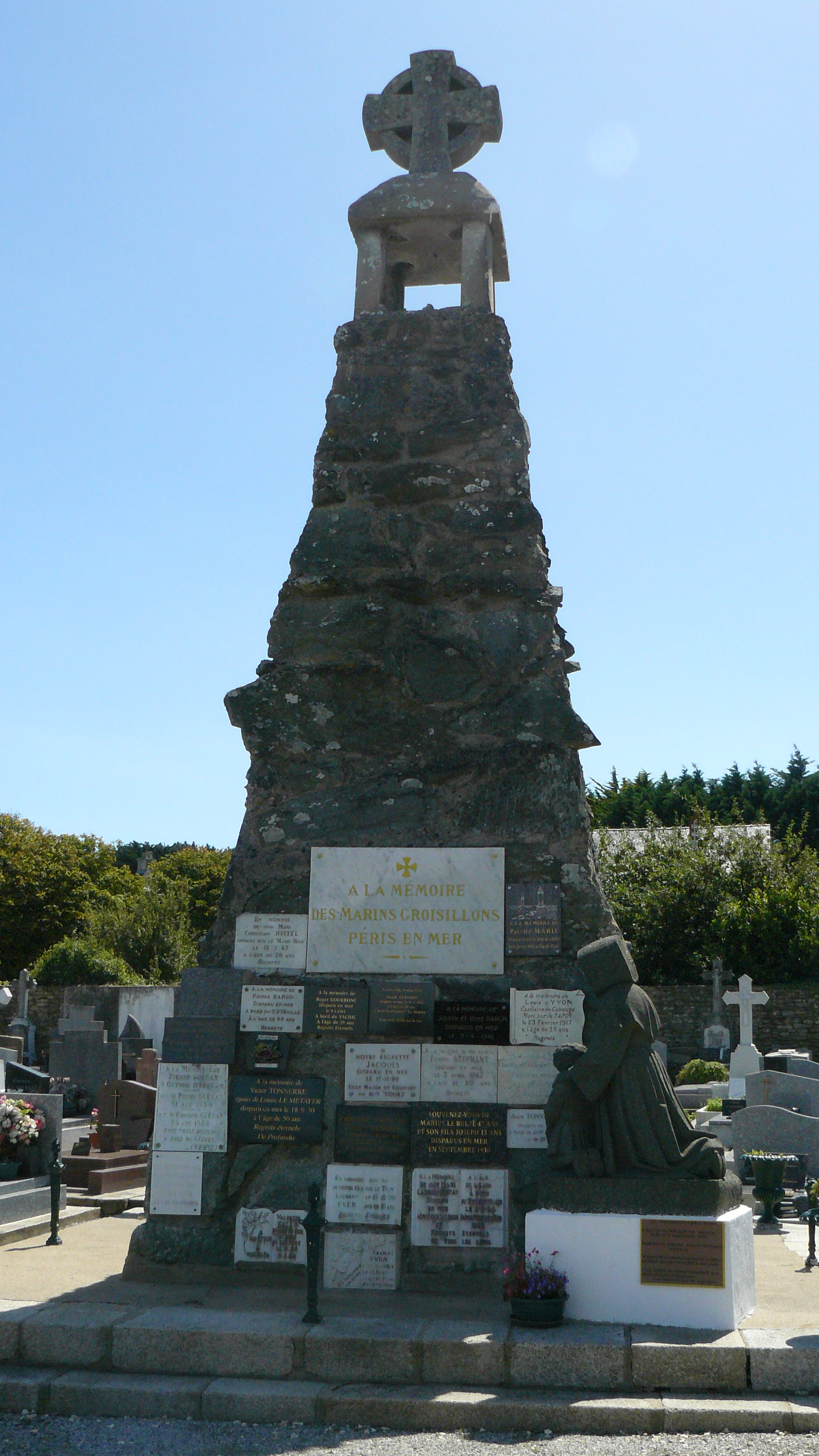 Cimetière de Groix